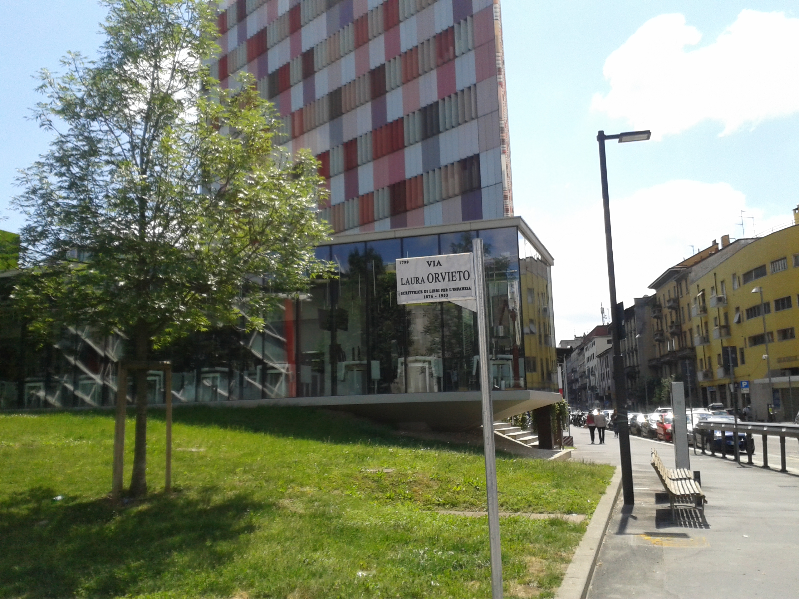 Milano, area dedicata